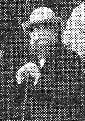 Русский философ Лев Михайлович Лопатин в последние годы жизни